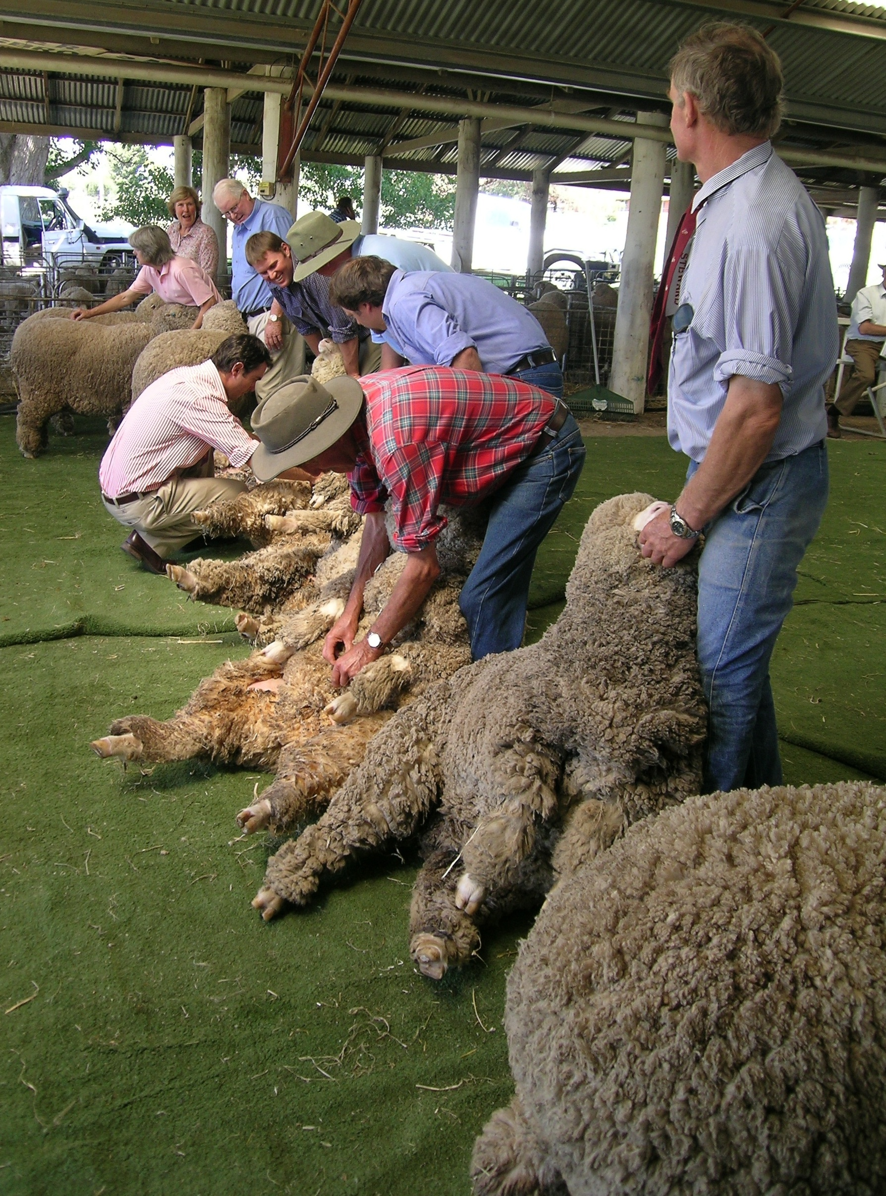 Merino ewe judging, Walcha, NSW